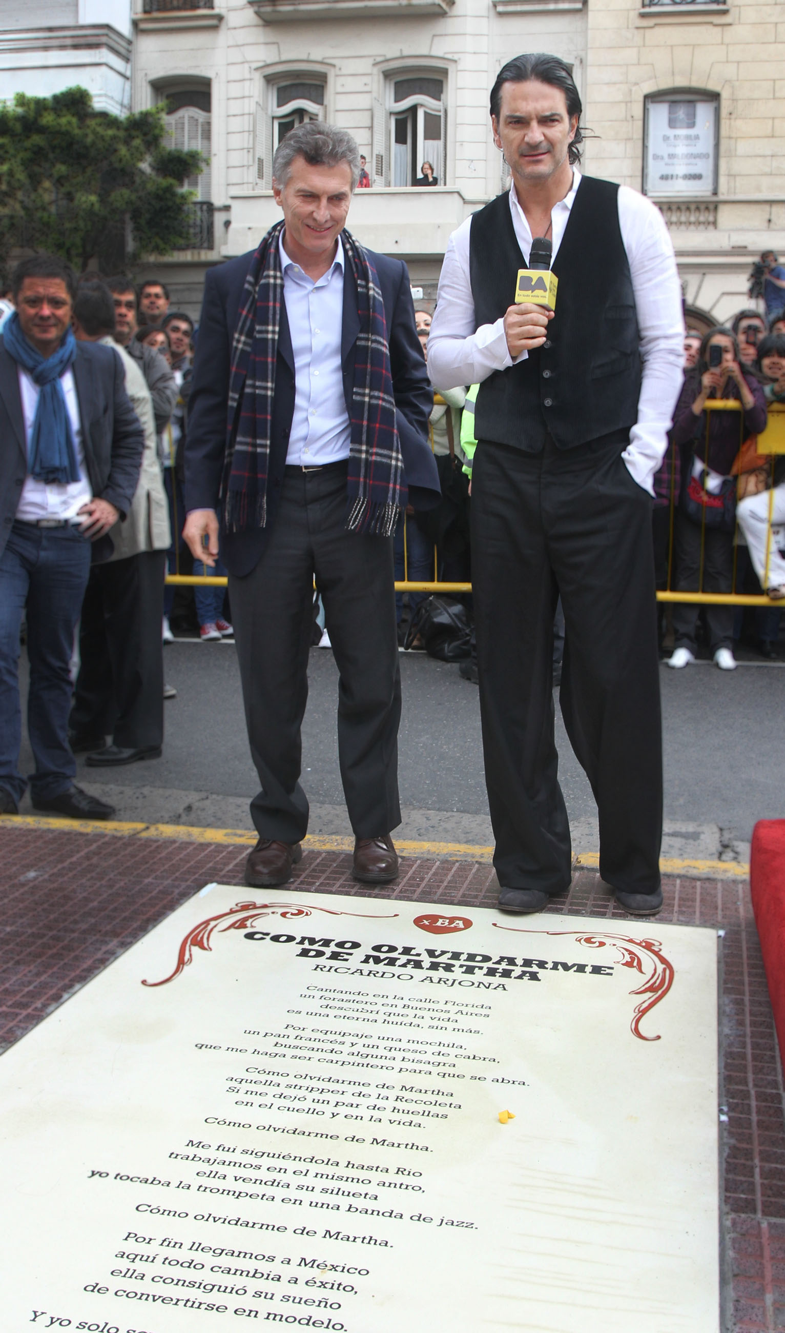 Buenos Aires. Mayo 14 de 2012. El jefe de Gobierno porteño, Mauricio Macri, inauguró hoy un baldosón recordatorio en homenaje al compositor y cantante guatemalteco Ricardo Arjona, ubicado en Callao y Córdoba, en el marco del programa cultural que reconoce a grandes figuras de la música popular. Lo acompañó el jefe de Gabinete, Horacio Rodríguez Larreta.